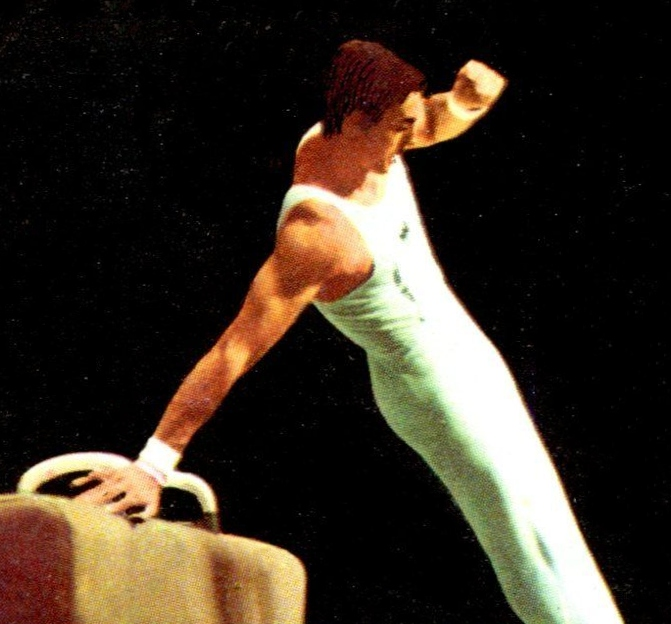 MUNCHEN 72 - Figurina-Stickers - Panini - N° 229 - MOESSINGER-DDR-GINNASTICA-Rec